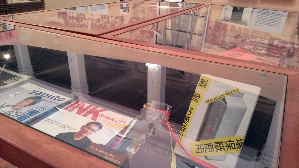 中文（台灣）: 《好燙詩刊：微波請按一》於2013臺北文學季文青生活考特展展出。